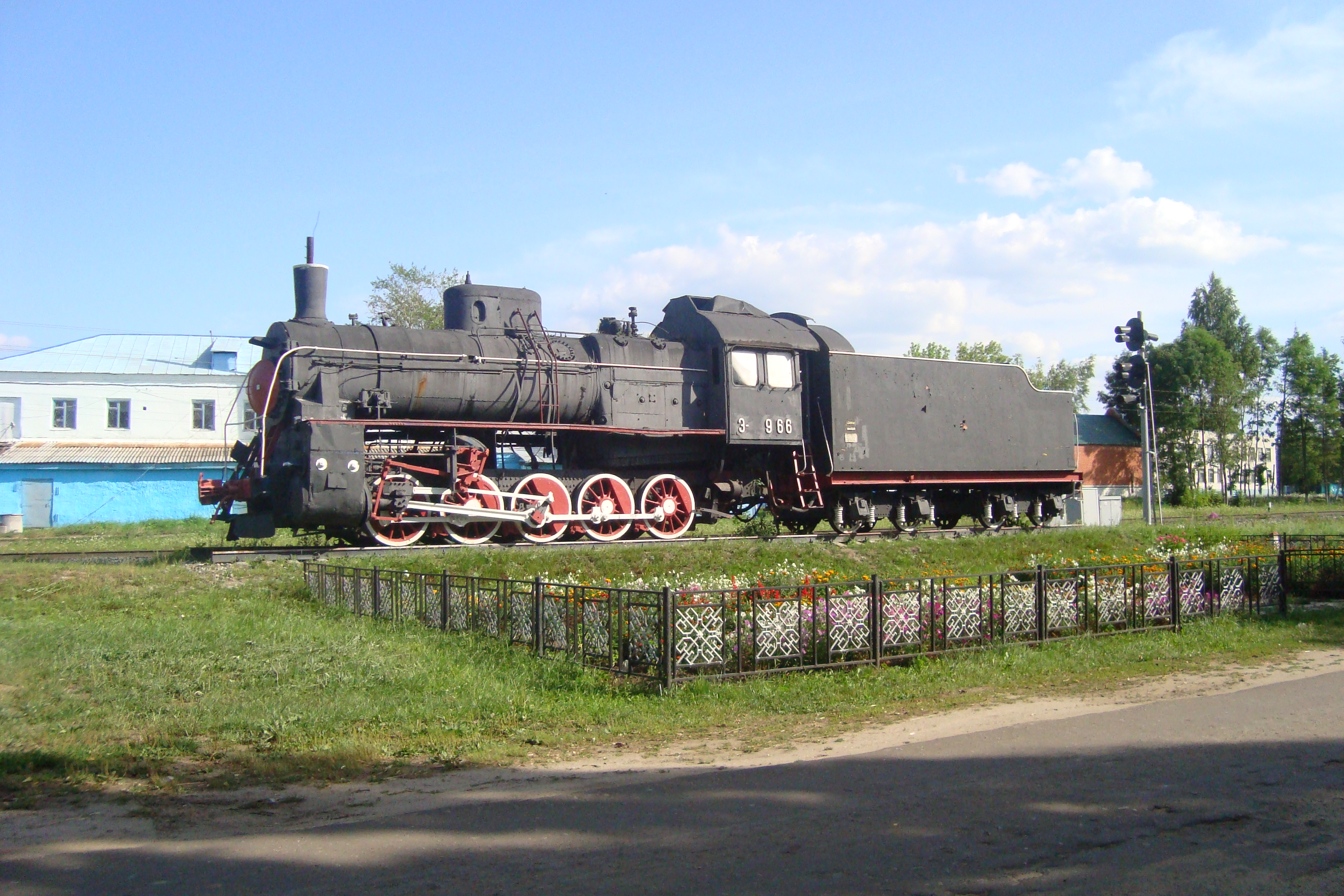 Паровоз-памятник в Ибресях